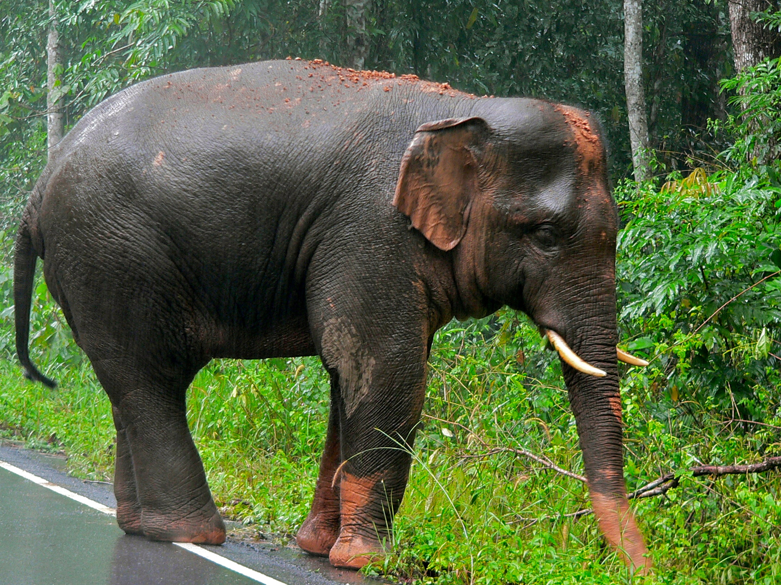 Khao Yai NP, THAILAND